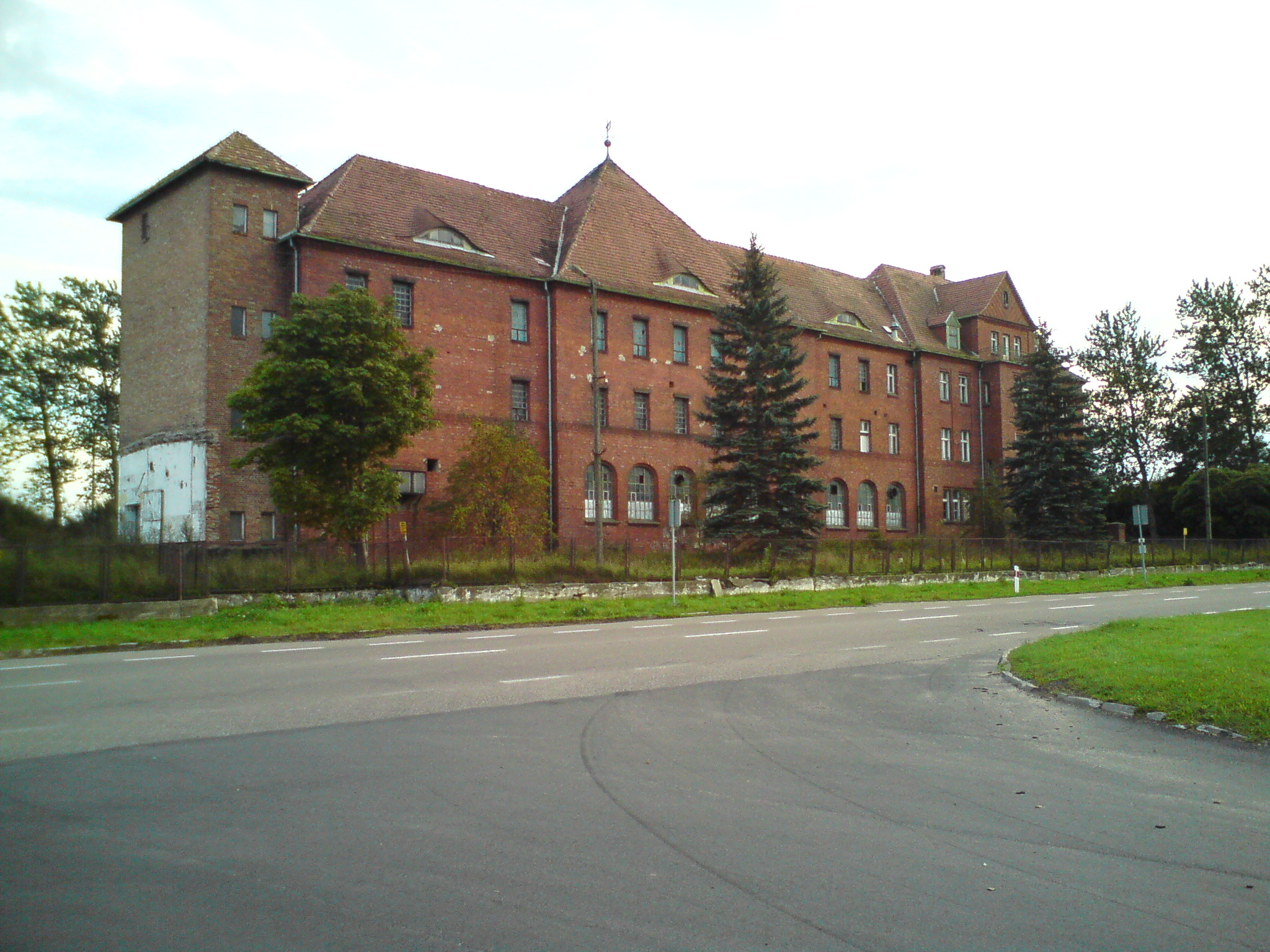 Dawny budynek fabryki konserw, ostatnio używany jako zakłady drobiarskie.